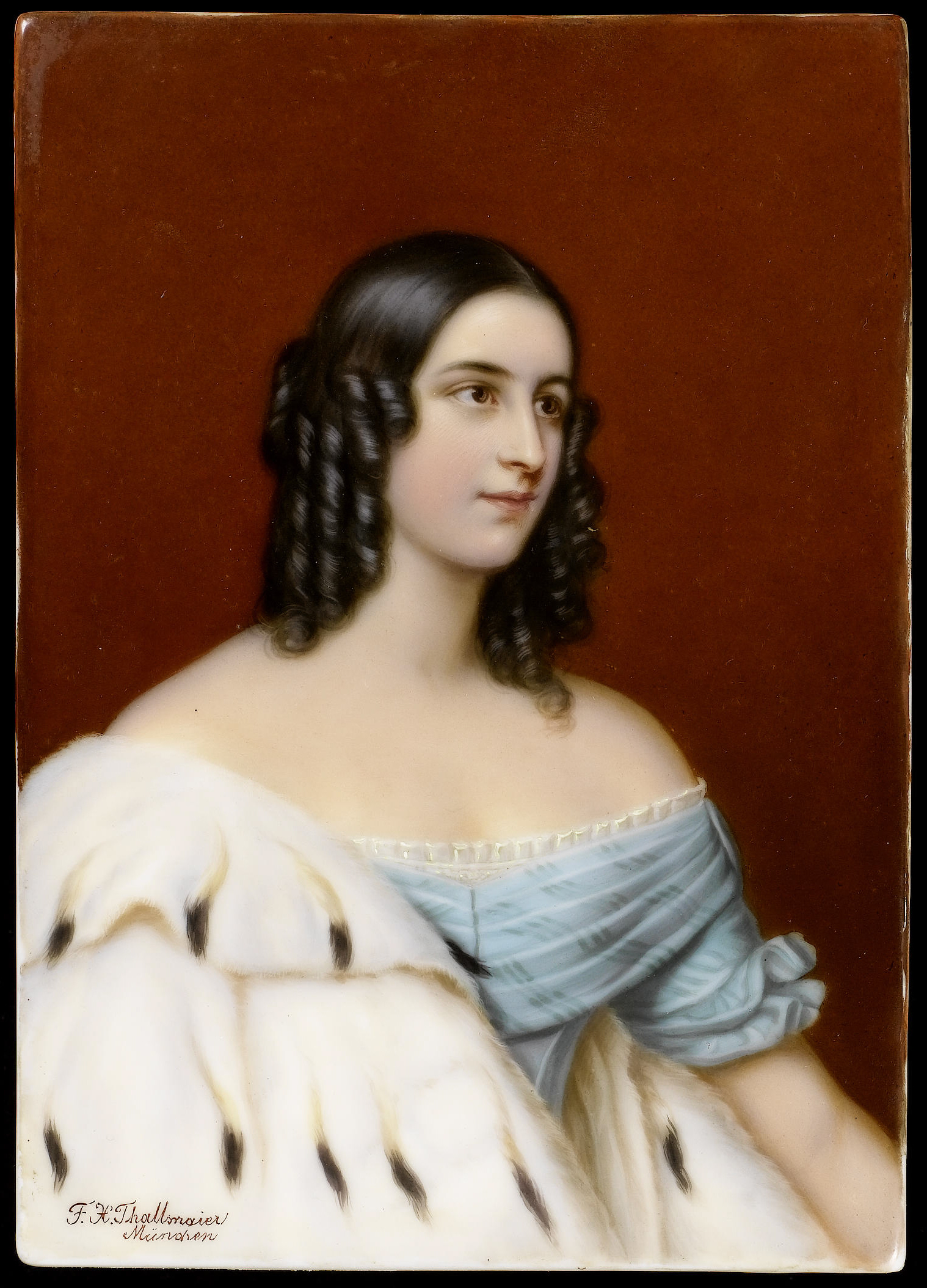 Caroline Princess of Oettingen-Oettingen und Wallerstein